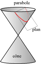 Parabole : intersection d'un cône avec un plan parallèle à une des génératrices du cône Auteur : Christophe Dang Ngoc Chan, réalisé avec un programme de dessin vectoriel Licence GFDL Christophe Dang Ngoc Chan